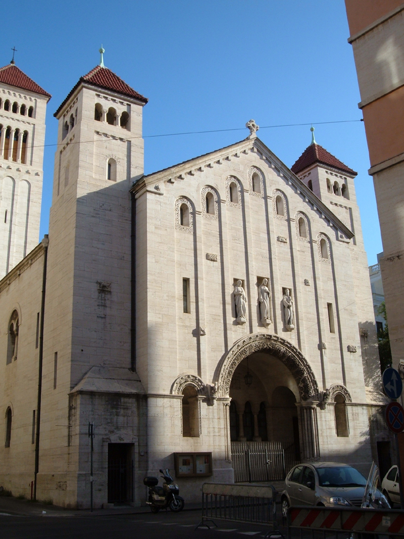 Chiesa evangelica luterana di Roma, nel rione Ludovisi.